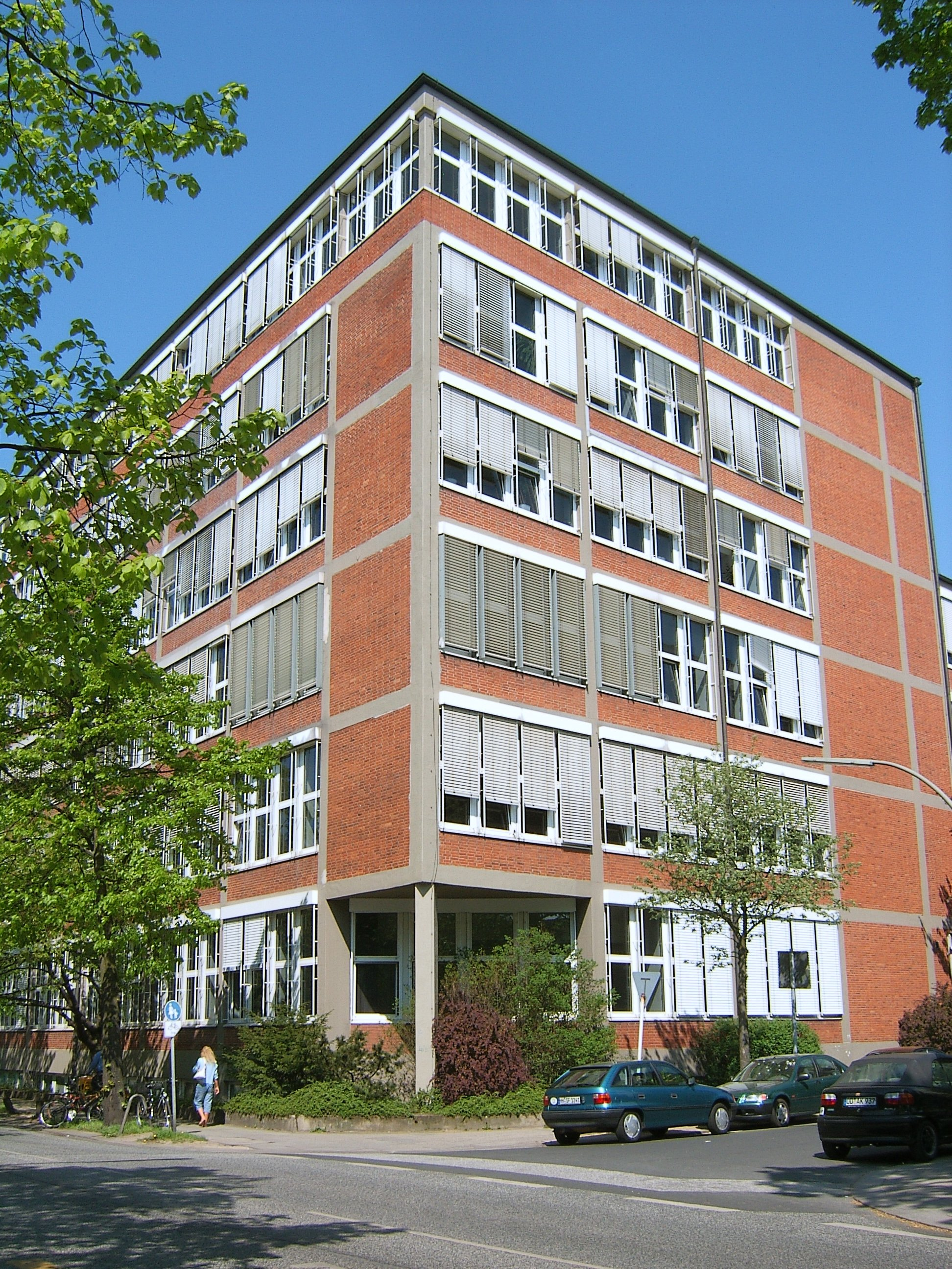 Schuhfabrik „Tretorn“, heute Hauptverwaltung von Fielmann; Hamburg, Barmbek, Fielmann-Verwaltung